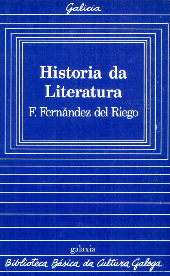 Biblioteca Básica da Cultura Galega, 05, Historia da literatura, F. Fernández del Riego.